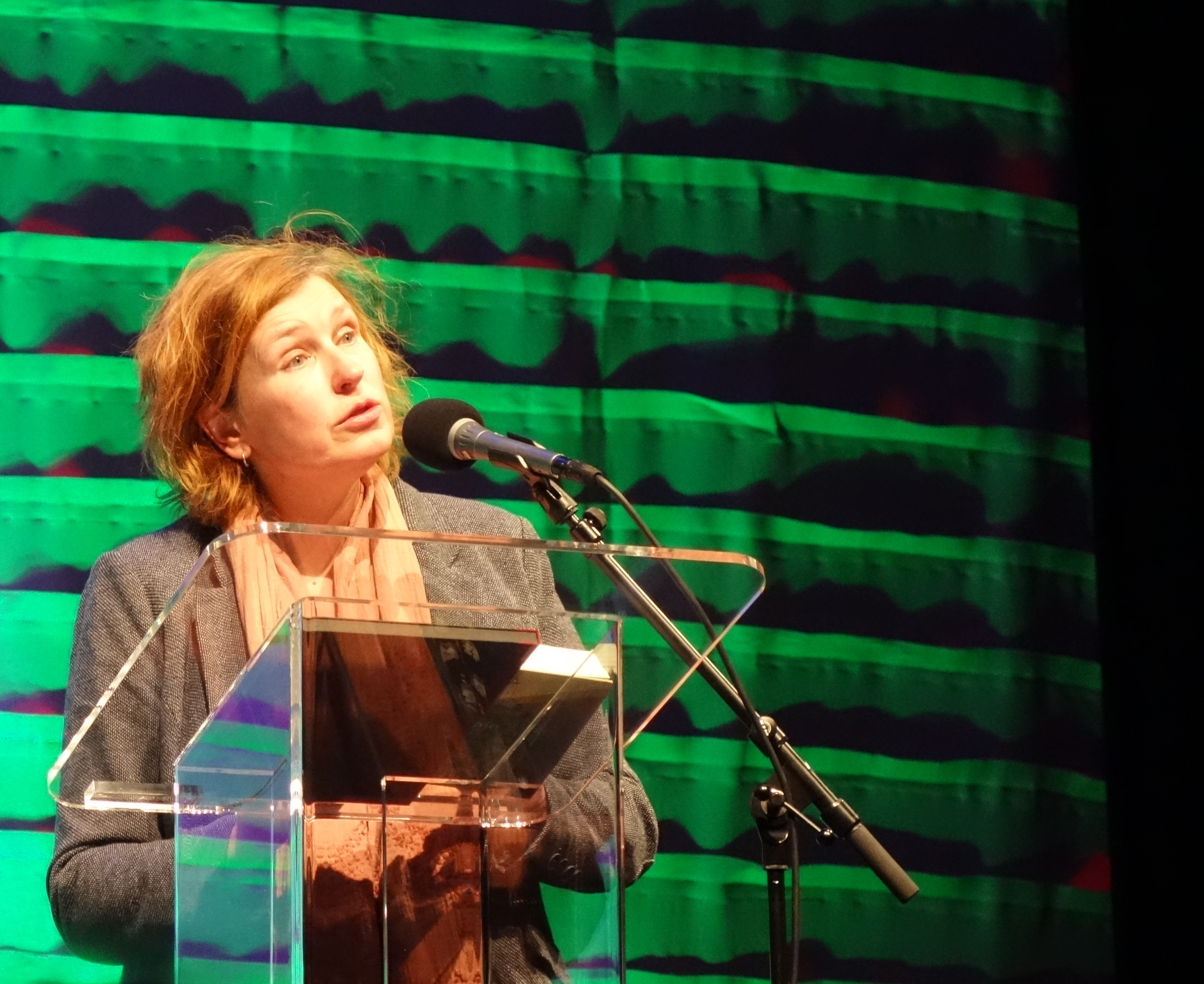 Annet Schaap tijdens Winternachten 2018 (Writers Unlimited), Den Haag. Nienke van Hichtum-prijs voor Lampje